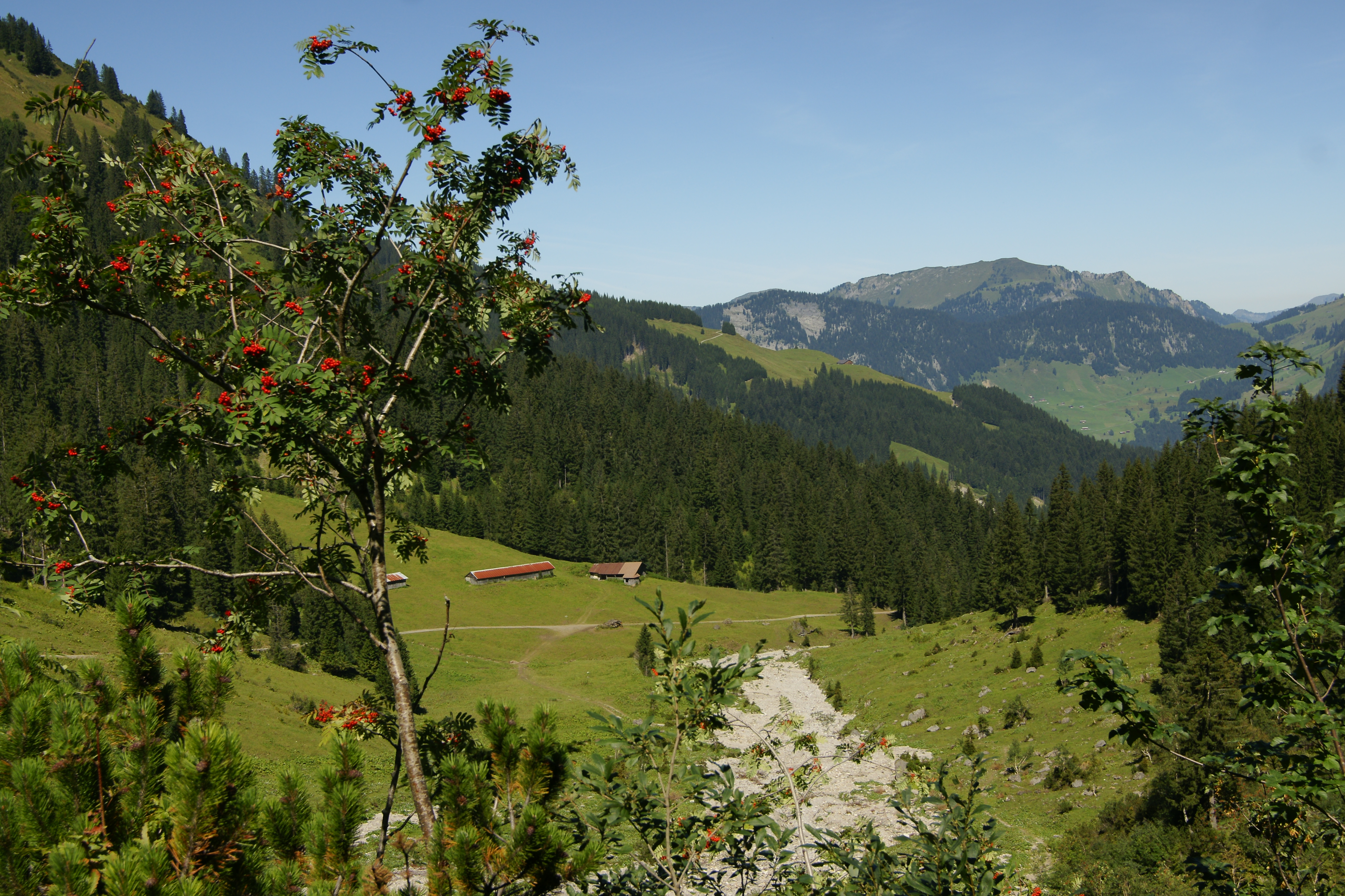 Annalperau Alpe im Dürrenbachtal der Gemeinde Au im Bregenzerwald. Hier führt der Weg zum Zitterklapfen vorbei. Im Vordergrund ein Vogelbeerbaum oder Eberesche (Sorbus aucuparia). Sie ist ein Laubbaum in der Gattung Mehlbeeren (Sorbus).